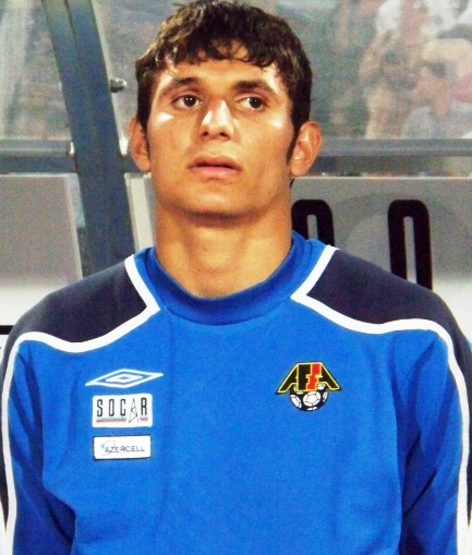 футболист Салахат Агаев (Азербайджан)